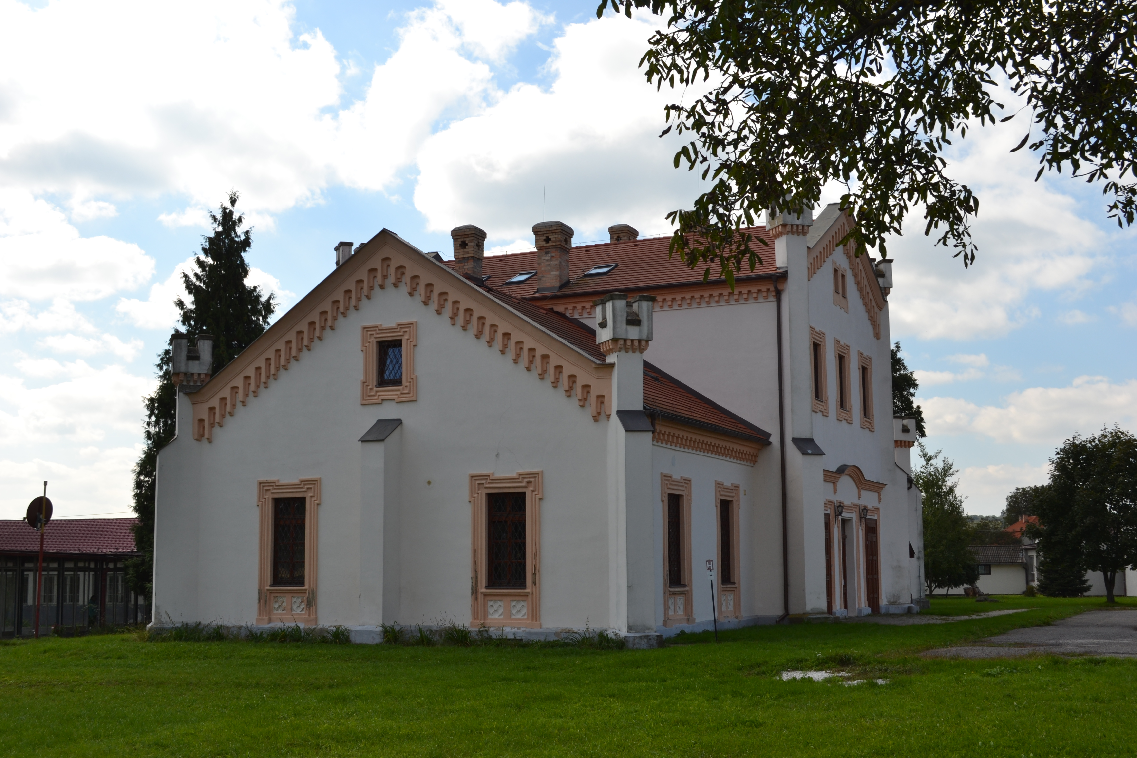 Neskoro-klasicistická kúria s historizujúcou fasádou v Čerenčanoch. (tzv. Zmeškalova kúria)